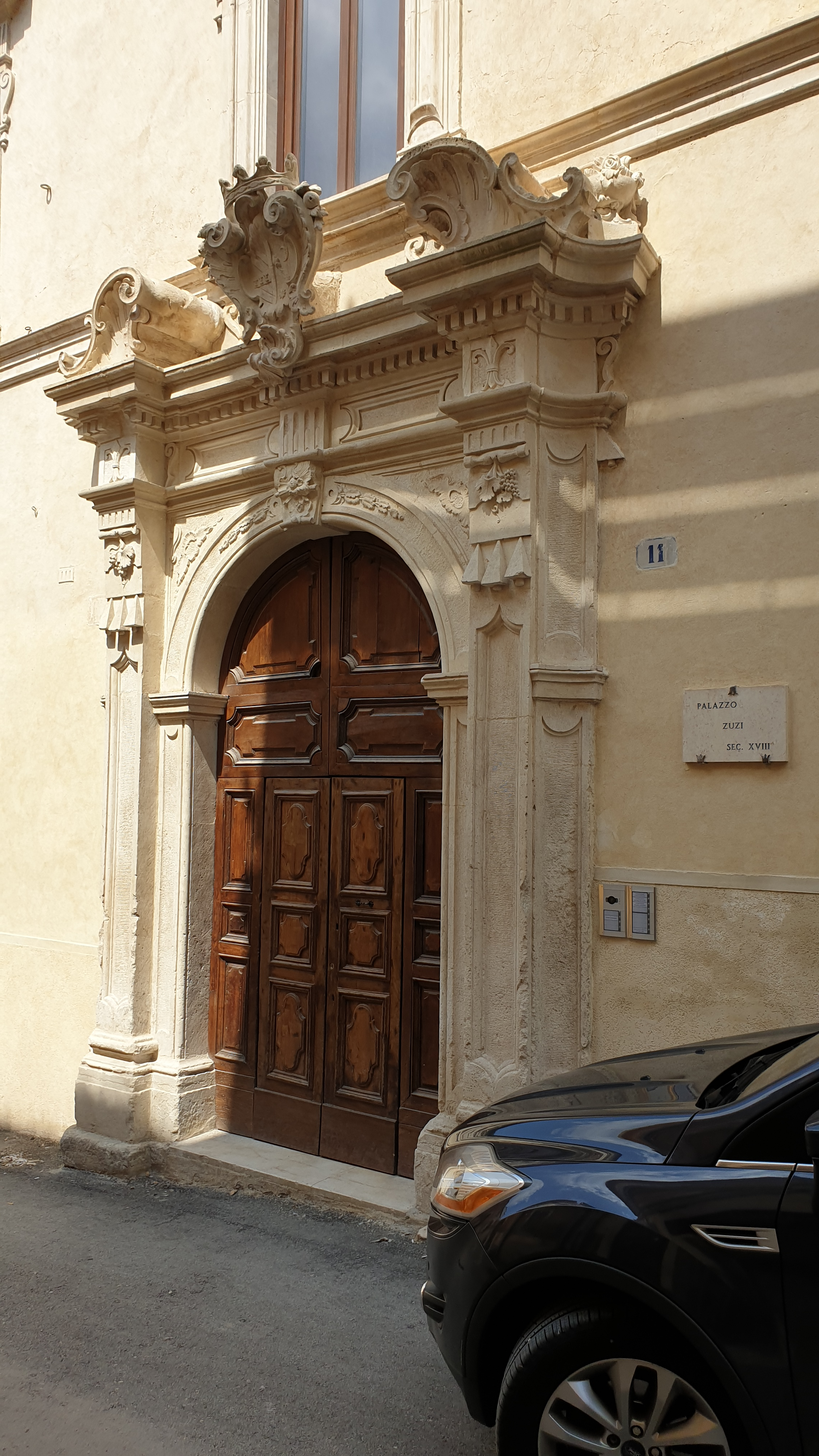 L'Aquila: Palazzo Zuzi